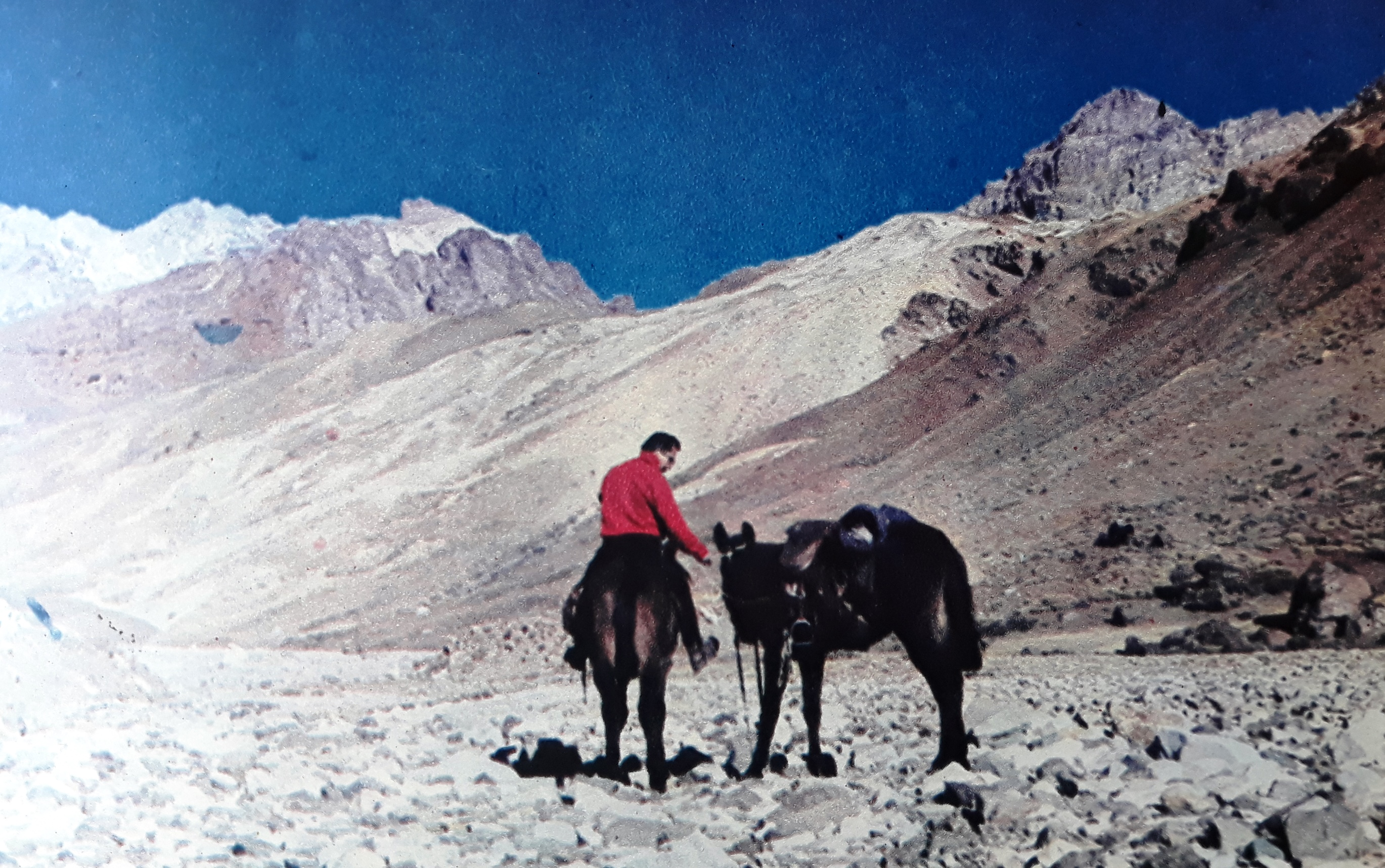 Badanie zlewni Rio Aconcagua